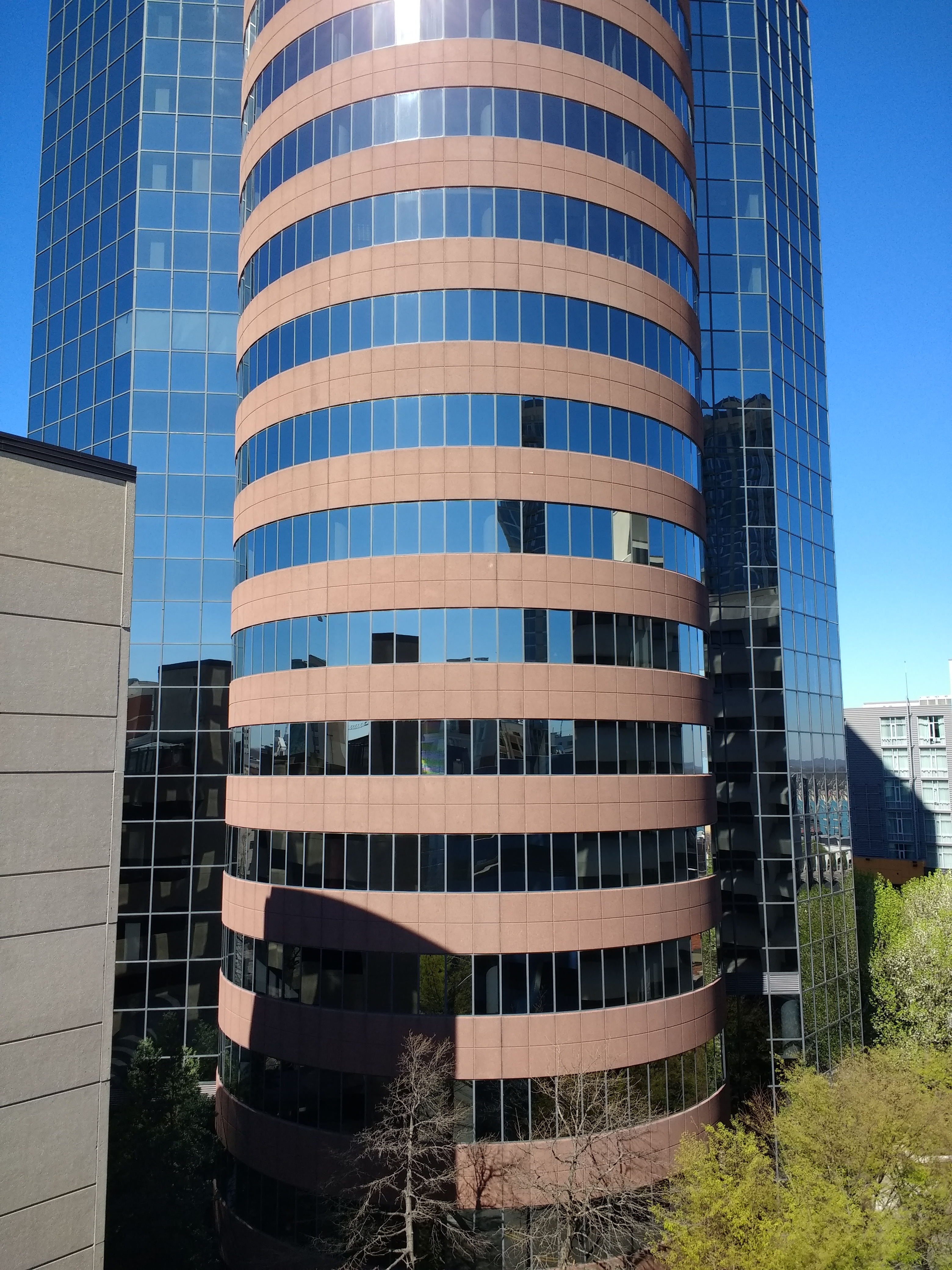 Palmer Plaza in Nashville, Tennessee.